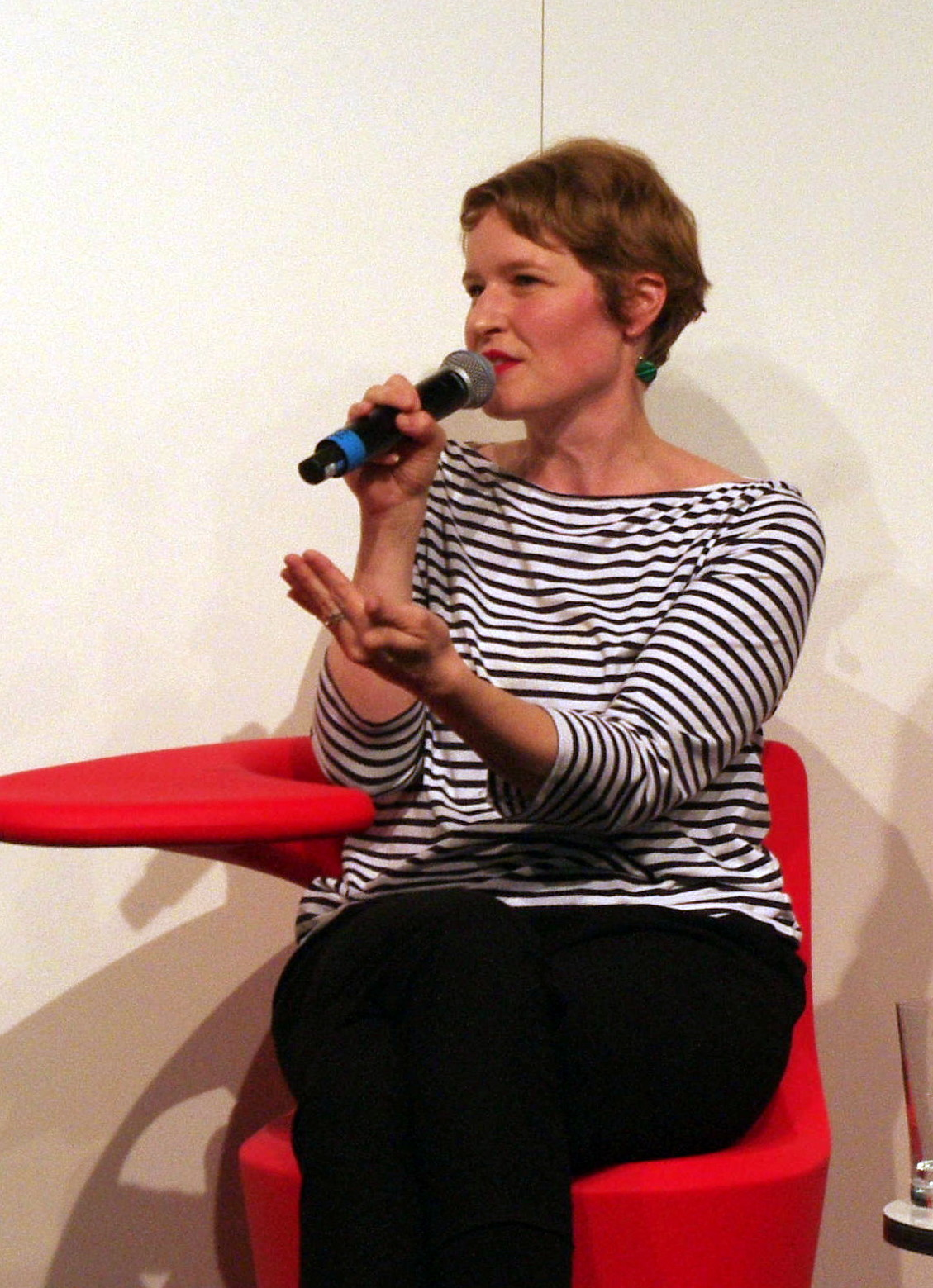 Buchmesse Frankfurt im Oktober 2017 - Podiumsdiskussion: Bastian Brauns, Ressortleiter « kapital » Magazin Cicero Stefanie Lohaus, Mitgründerin, Mitherausgeberin Missy Magazin Georg Dahm, Geschäftsführer Fail Better Media GmbH